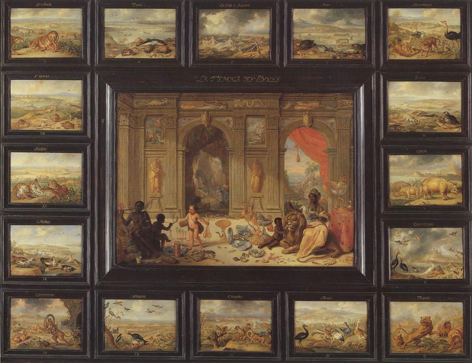 Gemälde „Der Erdteil Afrika“ mit 16 Bildern. „Der Erdteil Afrika“ ist Teil des Zyklus „Die vier Erdteile“.